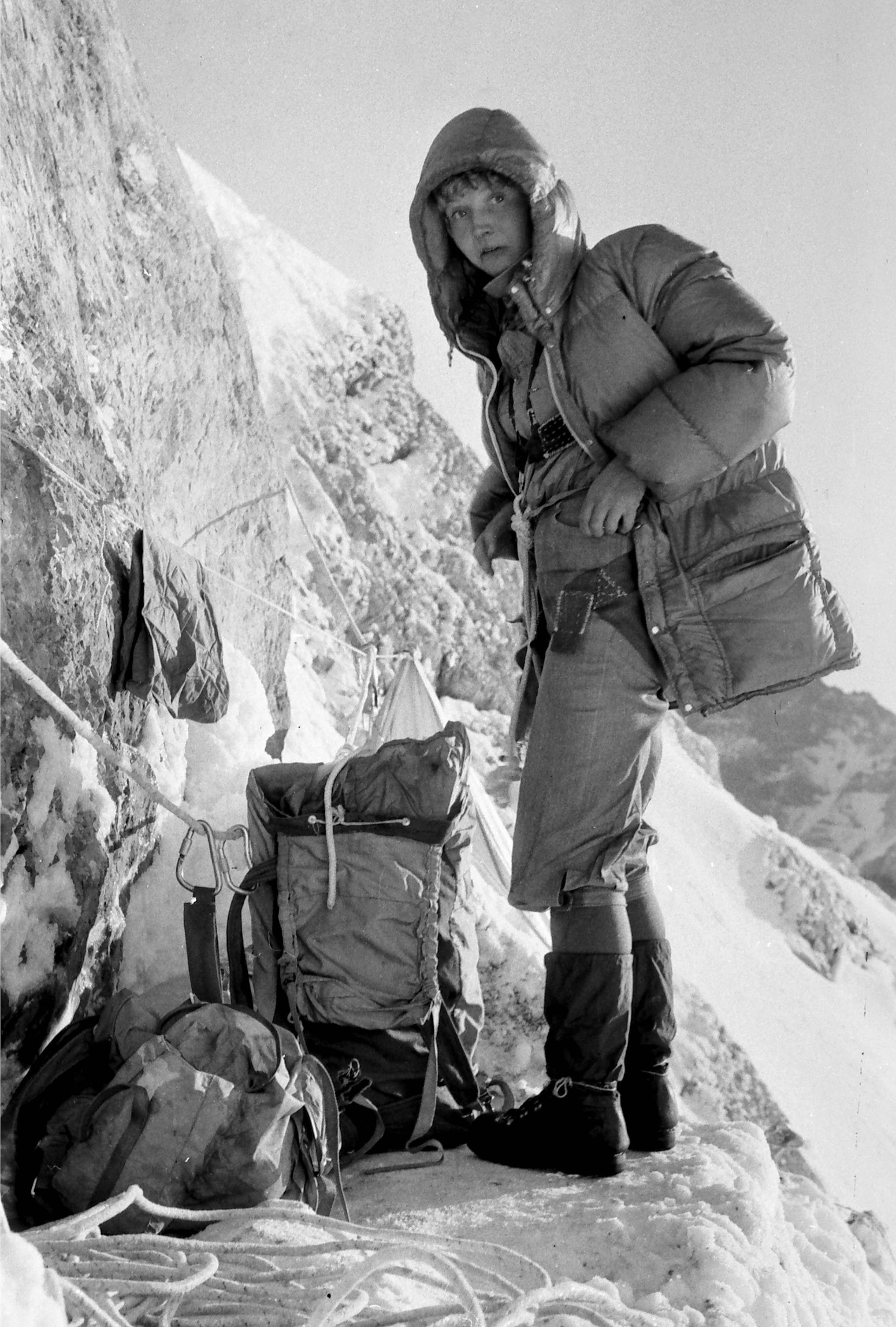 Helme Suuk. Ööbimine seinal-riiulil.